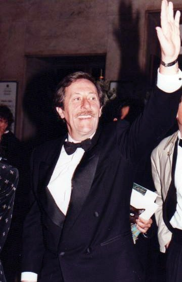 Jean Rochefort au festival de Cannes.